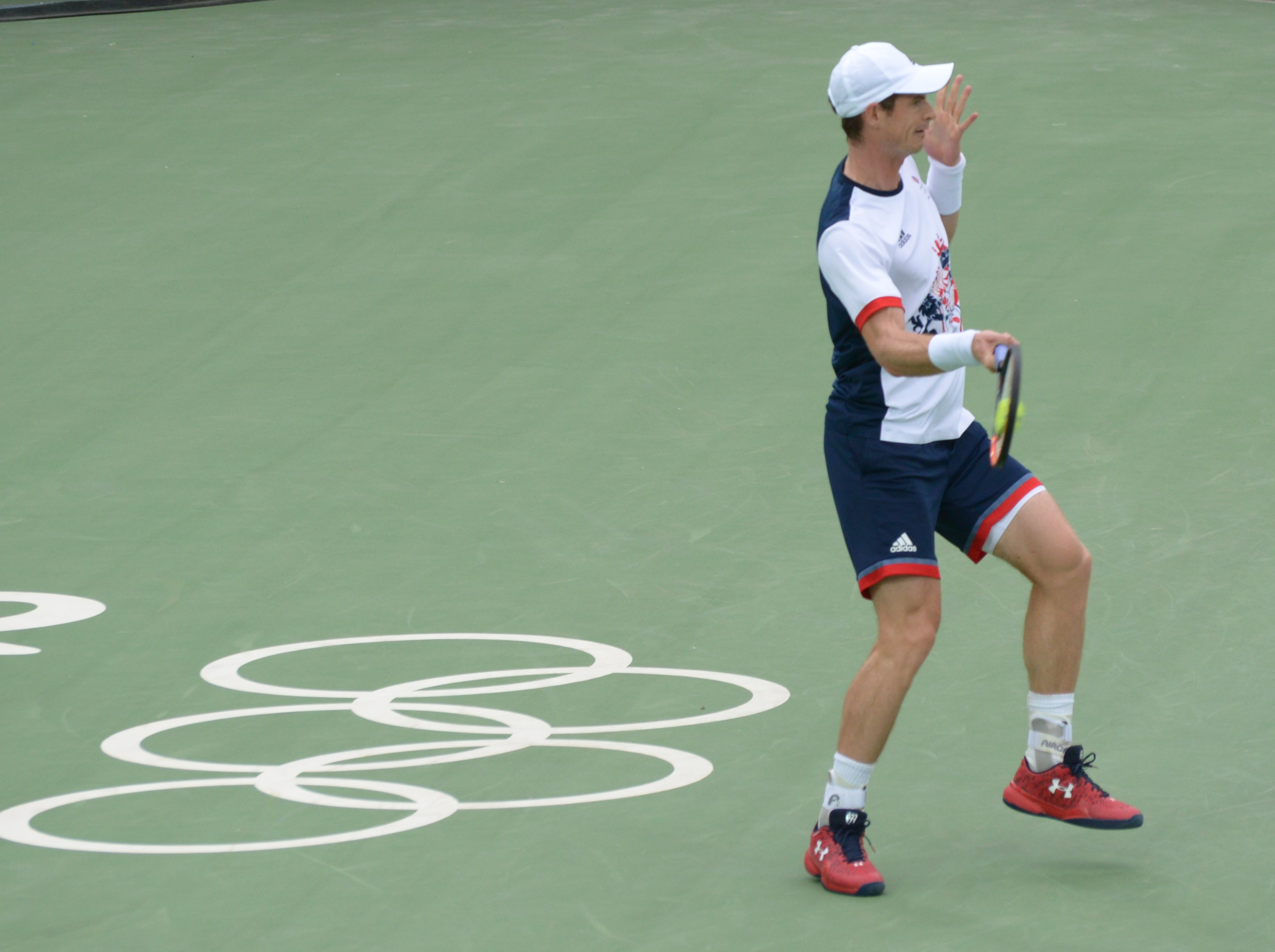 Andy Murray recebendo saque do sérvio Viktor Troicki na primeira rodada dos jogos olímpicos do Rio de Janeiro de 2016